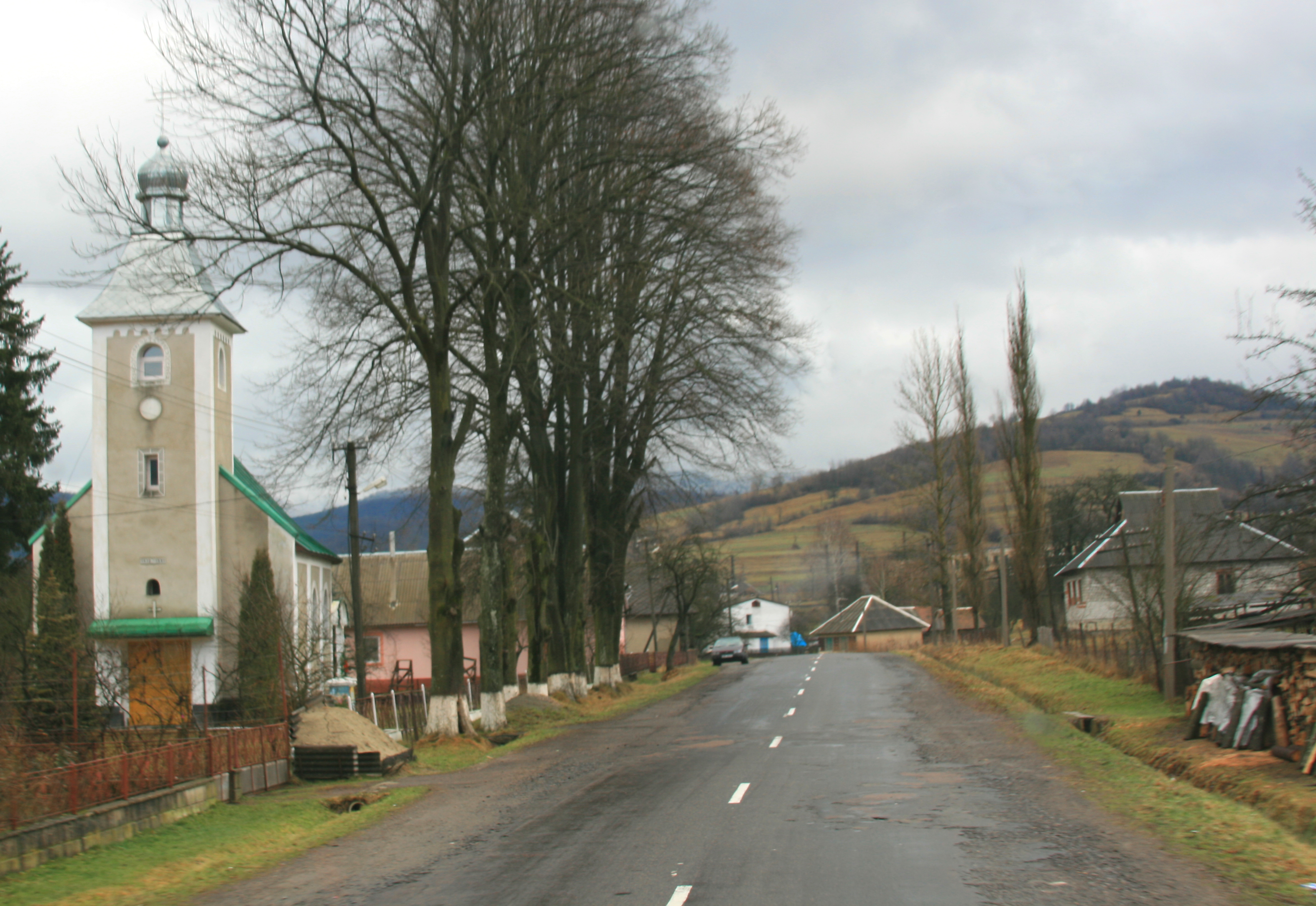 Улица в селе Волосянка на Закарпатье.